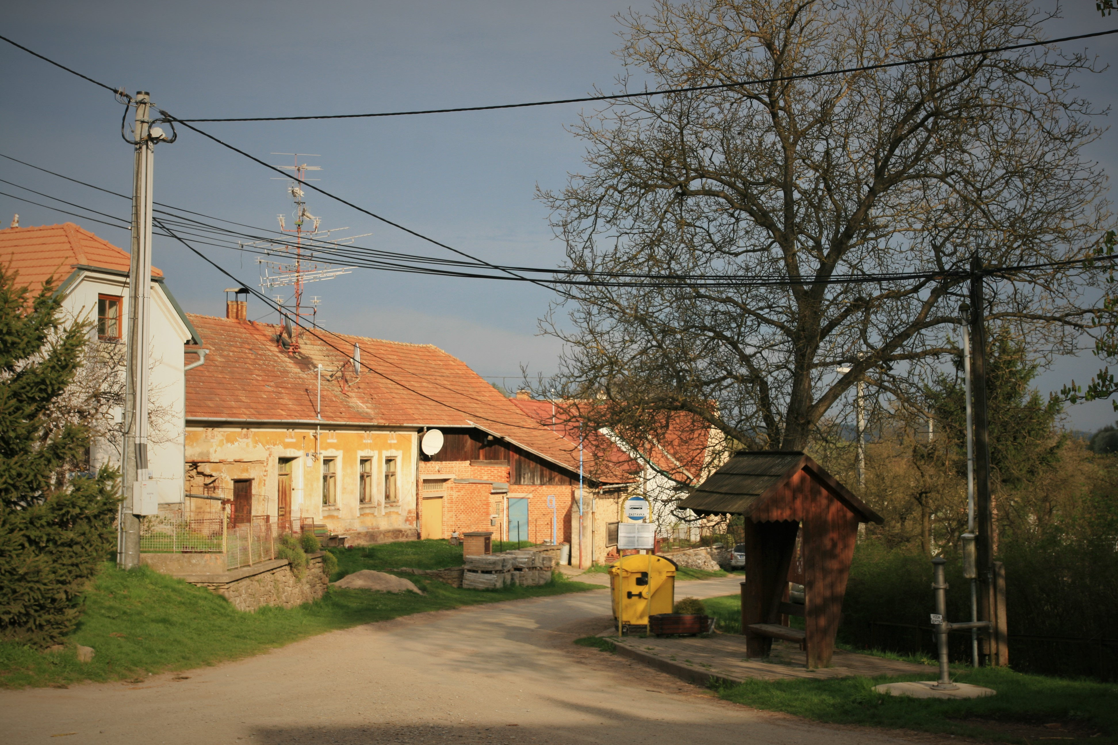 Vesnice Brusná, část obce Lomnice v okrese Brno-venkov. Pohled na náves od jihozápadu.